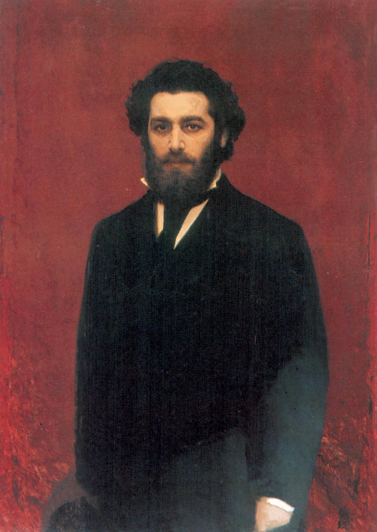 Иван Крамской. Портрет А.И.Куинджи. Конец 1870-х. Холст, масло. 118 x 84. Научно-исследовательский музей Российской Академии художеств.